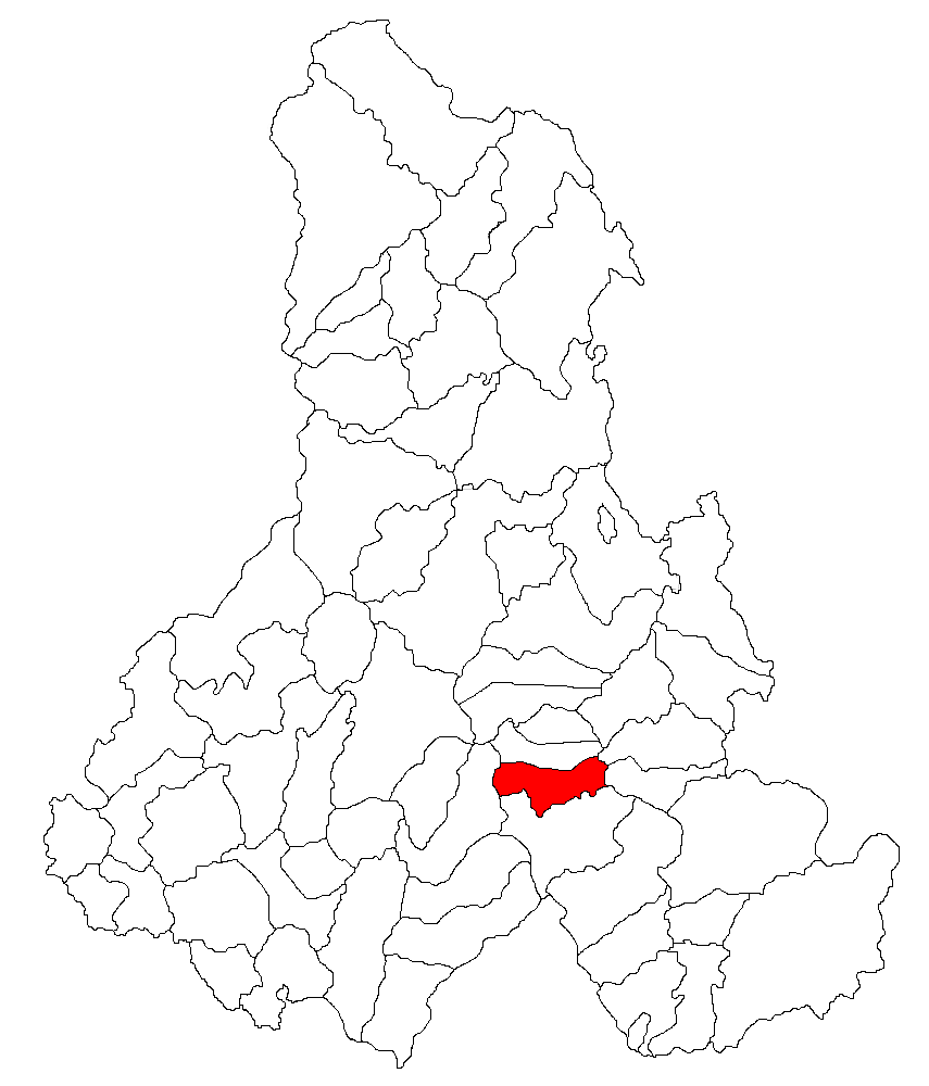 Categorie:Hărţi ale judeţului Harghita Contents 1 Licensing 2 Sursă 3 Licensing 4 Original upload log Licensing Sursă ro::Imagine:Harta_jud_Harghita.png